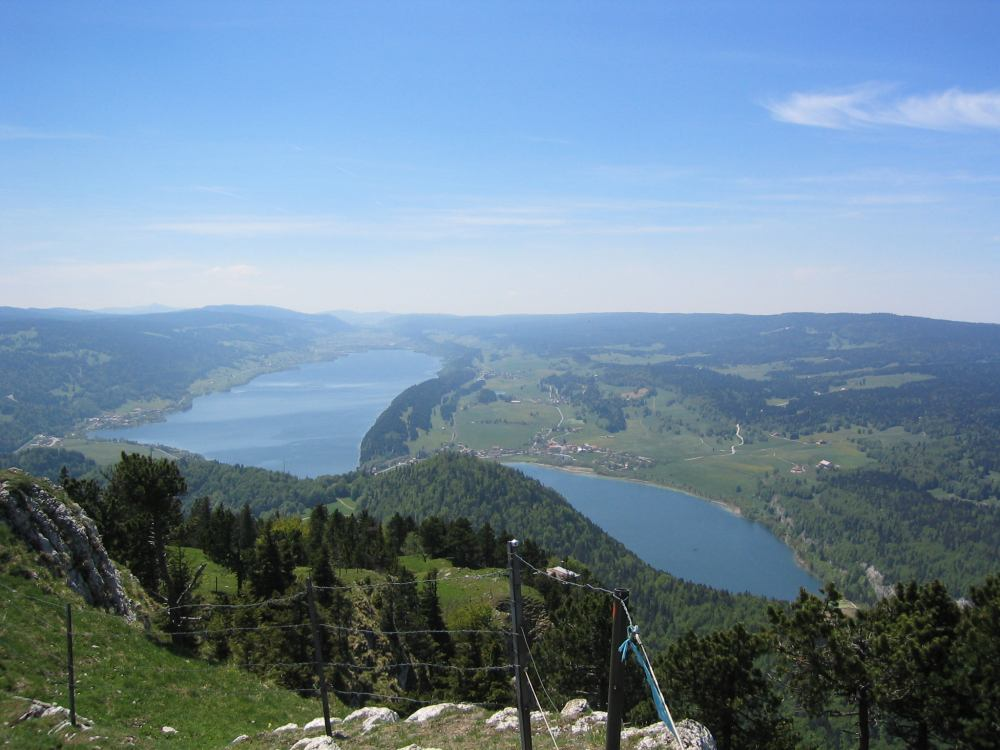 Lac De Joux and Lac Brenet, Vallée De Joux, Vaud, Switzerland. Picture taken by User:Crox from La Dent De Vaulion on 2004-05-29 at 13:59.